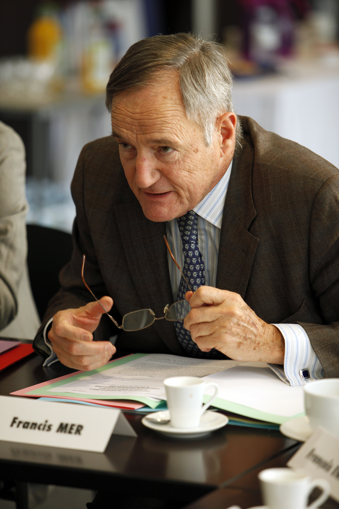 Conseil de surveillance (octobre 2009)